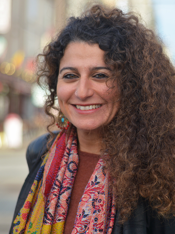 Zeina Abirached au Mans en décembre 2015.